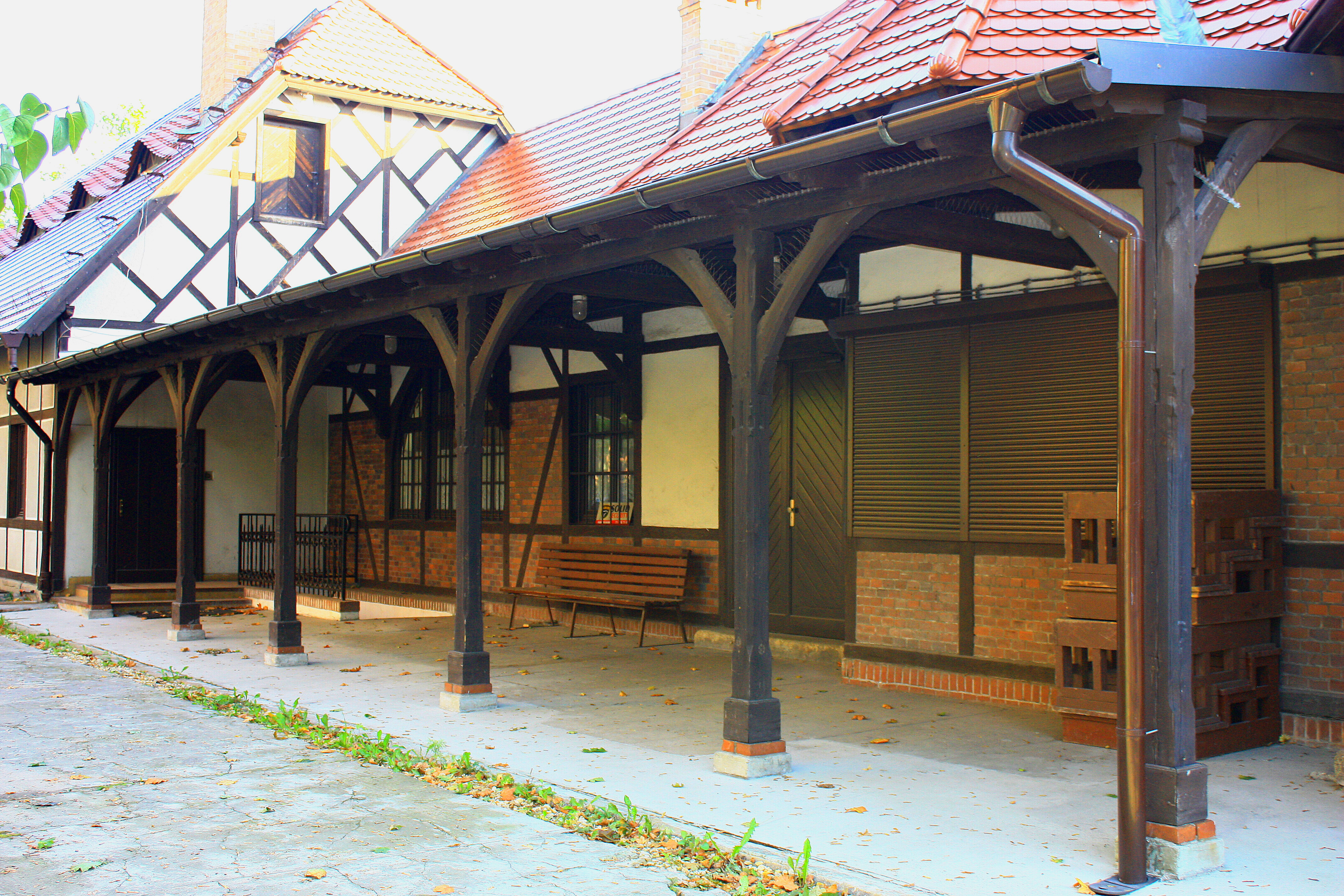 Wrocław, wiata peronowa, 4 ćw. XIX